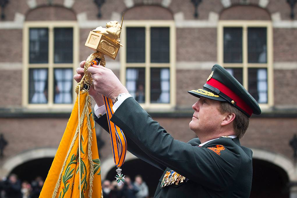 Uitreiking Militaire Willems-Orde aan het Korps Commandotroepen in 2016.